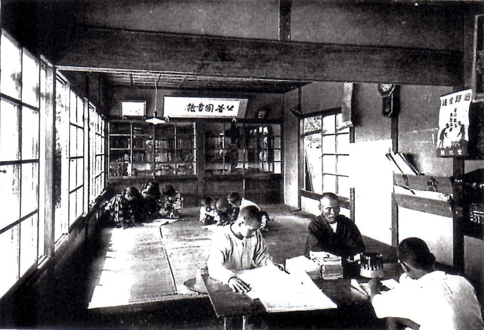 知多郡東浦村立公益図書館。現在の東浦町中央図書館。正面には「公益図書館」と書かれた額が見える。